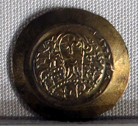 Palazzo Massimo alle Terme